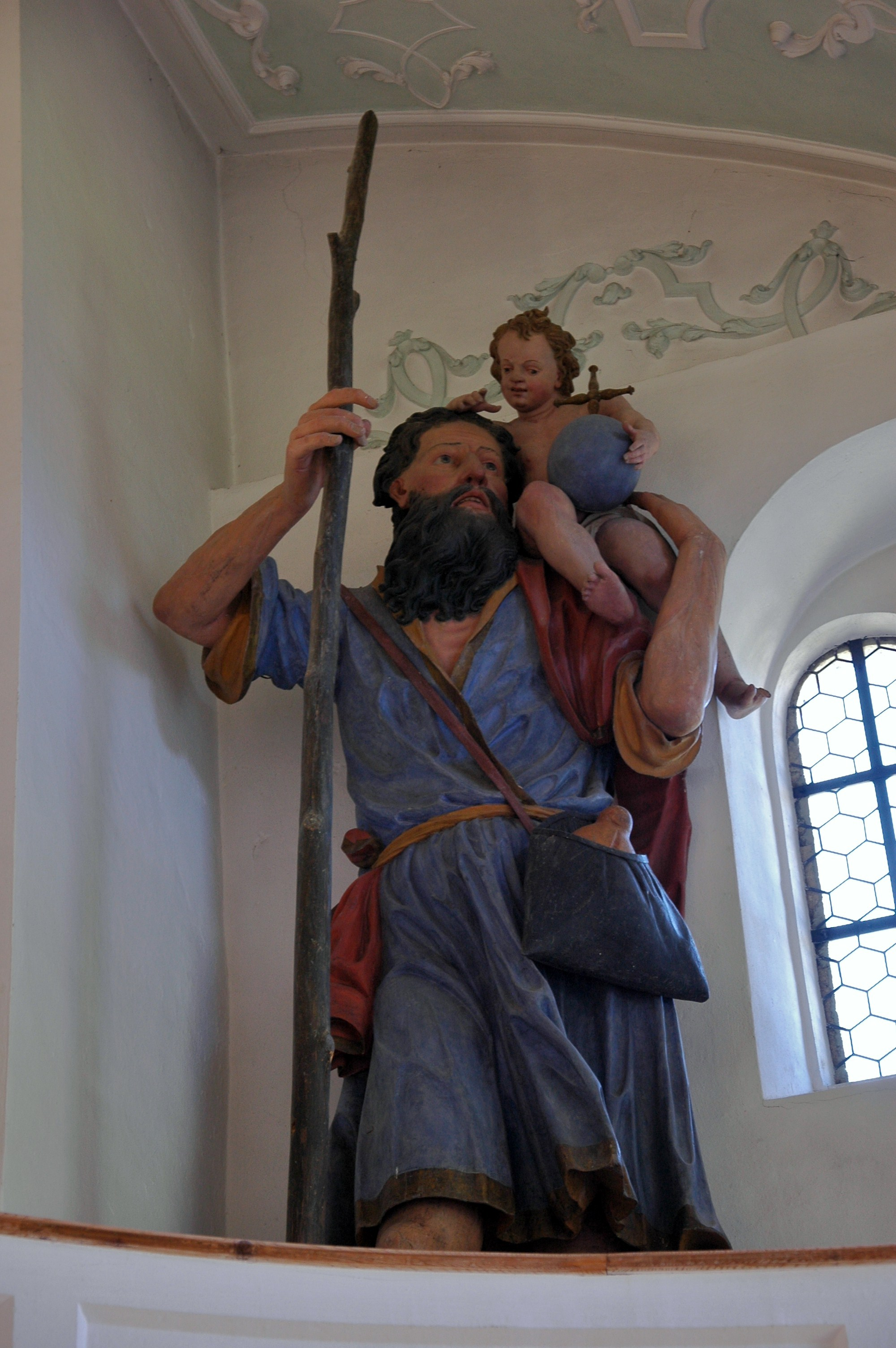 Statue des Heiligen Christophorus aus dem 17. Jahrhundert. Sie steht auf der Orgelemphore in der Wallfahrtskirche Mariä Heimsuchung in Ettenberg. Die Statue ist 4,30 m hoch.